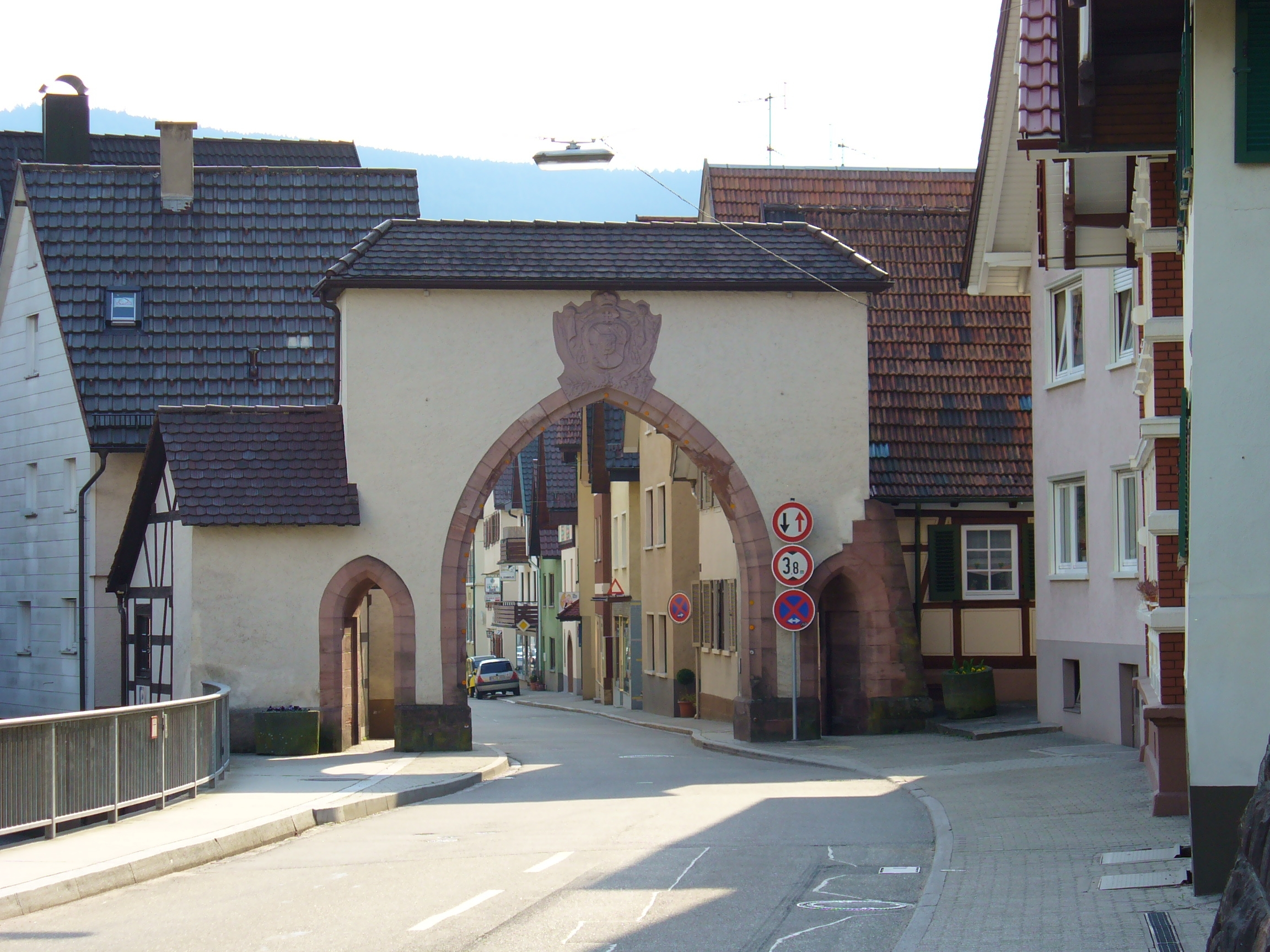 Beschreibung / description: Oberes Stadttor (auch Lierbacher Tor) in Oppenau, Deutschland / City gate at Oppenau, Germany Quelle / source: selbst fotografiert am / self made at 03. April 2005 Fotograf / photographer: User:Kerish Lizenz / licence